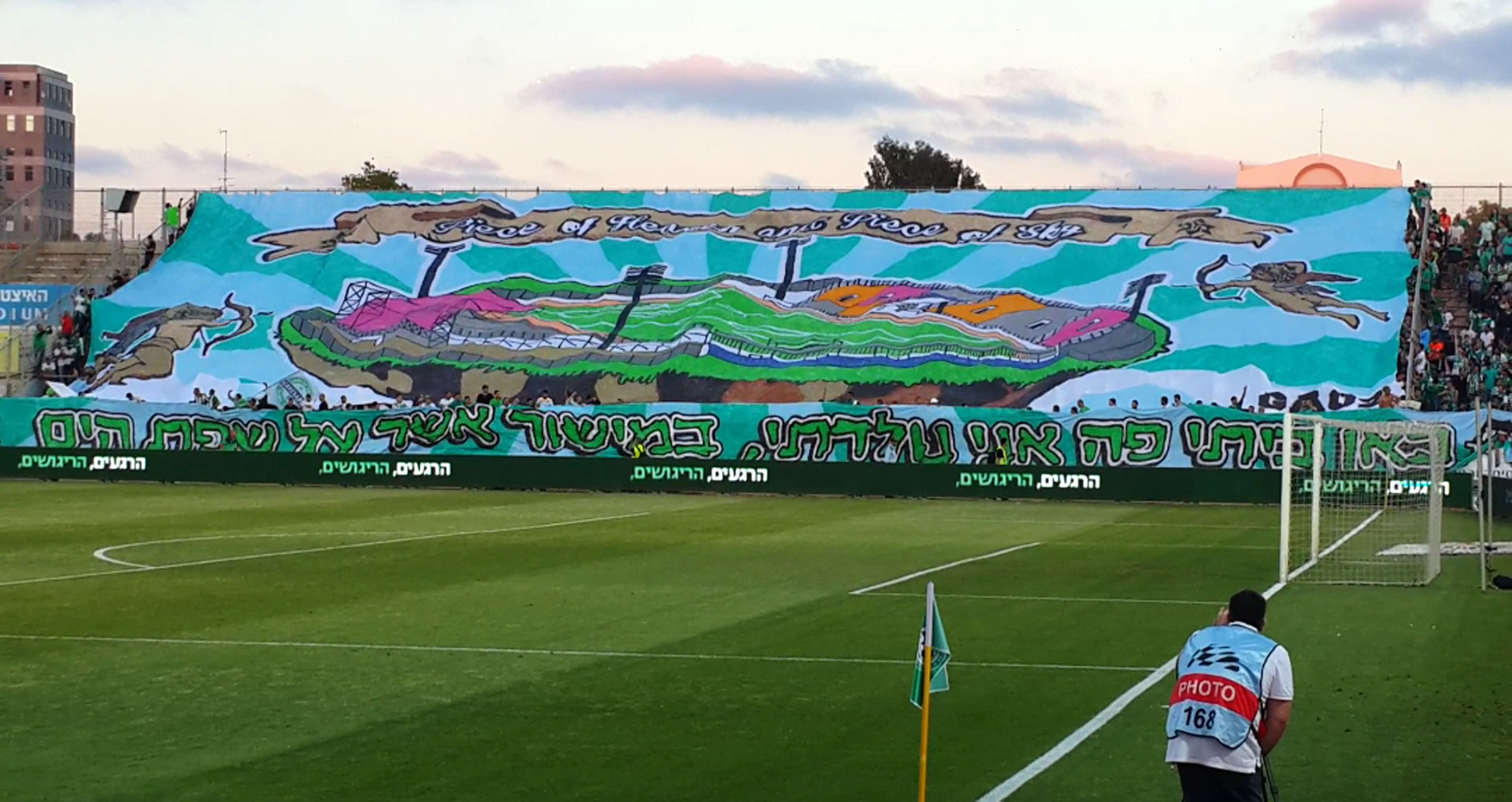 צילום ממשחק הליגה האחרון שנערך באצטדיון קריית אליעזר